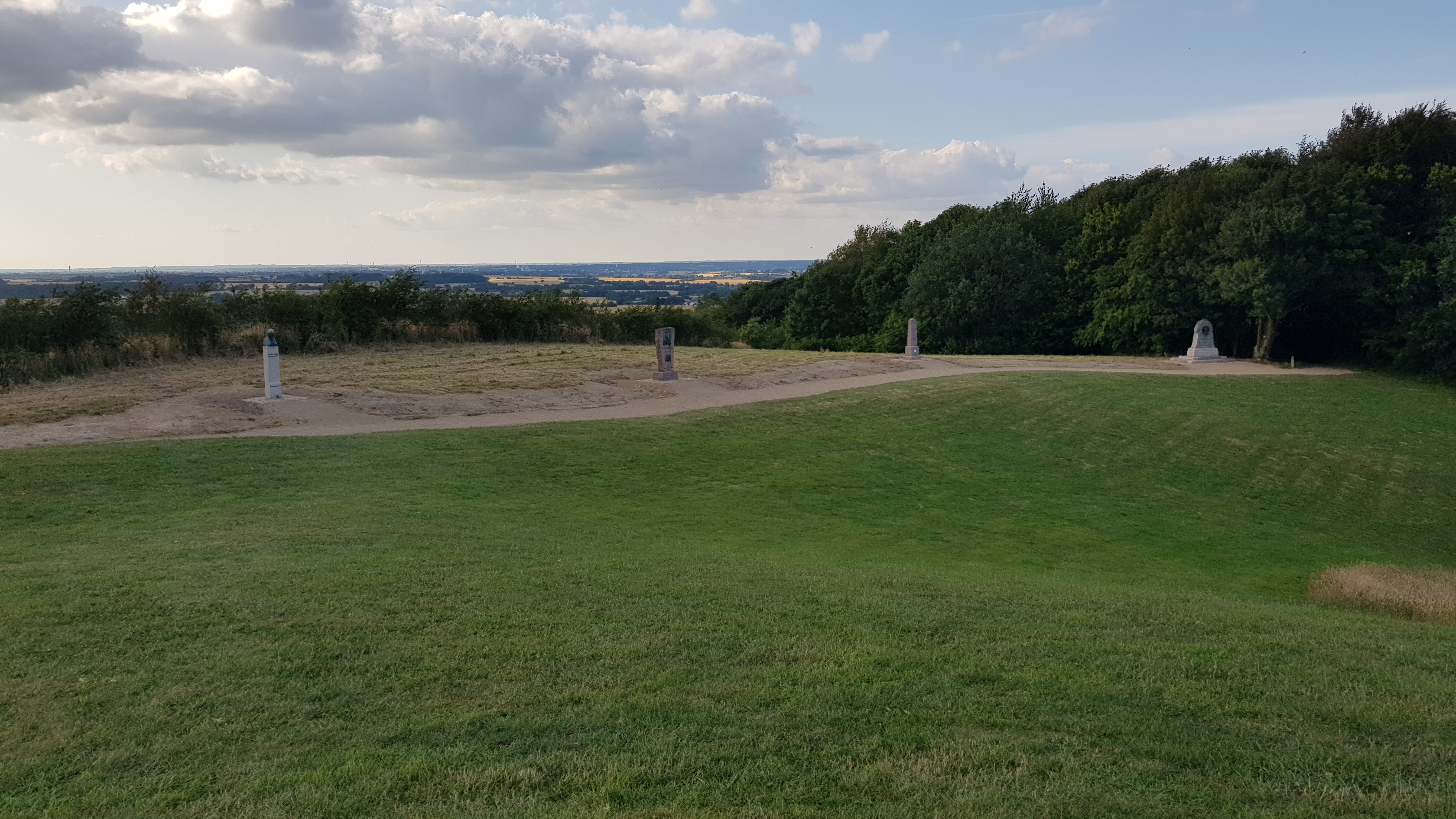 De 4 mindesmærker vest for talerstolen. Fra venstre mod højre er det Peder Skau, Christian Flor, Nicolai Frederik Severin Grundtvig og Mouritz Mørk Hansen